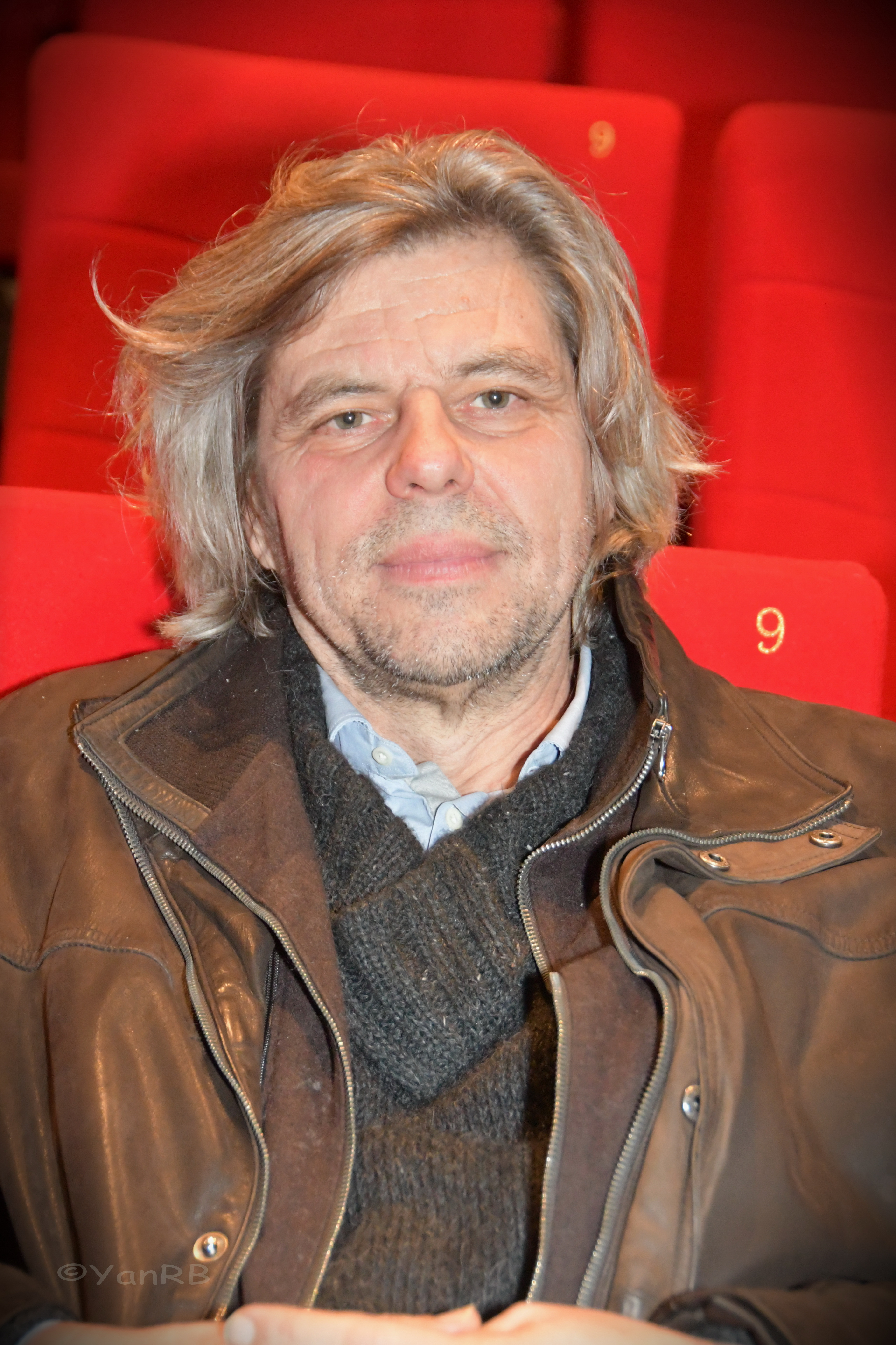 Éric Besnard à l'avant 1ere de son film l'esprit de famille au Gaumont Wilson Toulouse